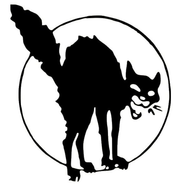 Анархистская символика